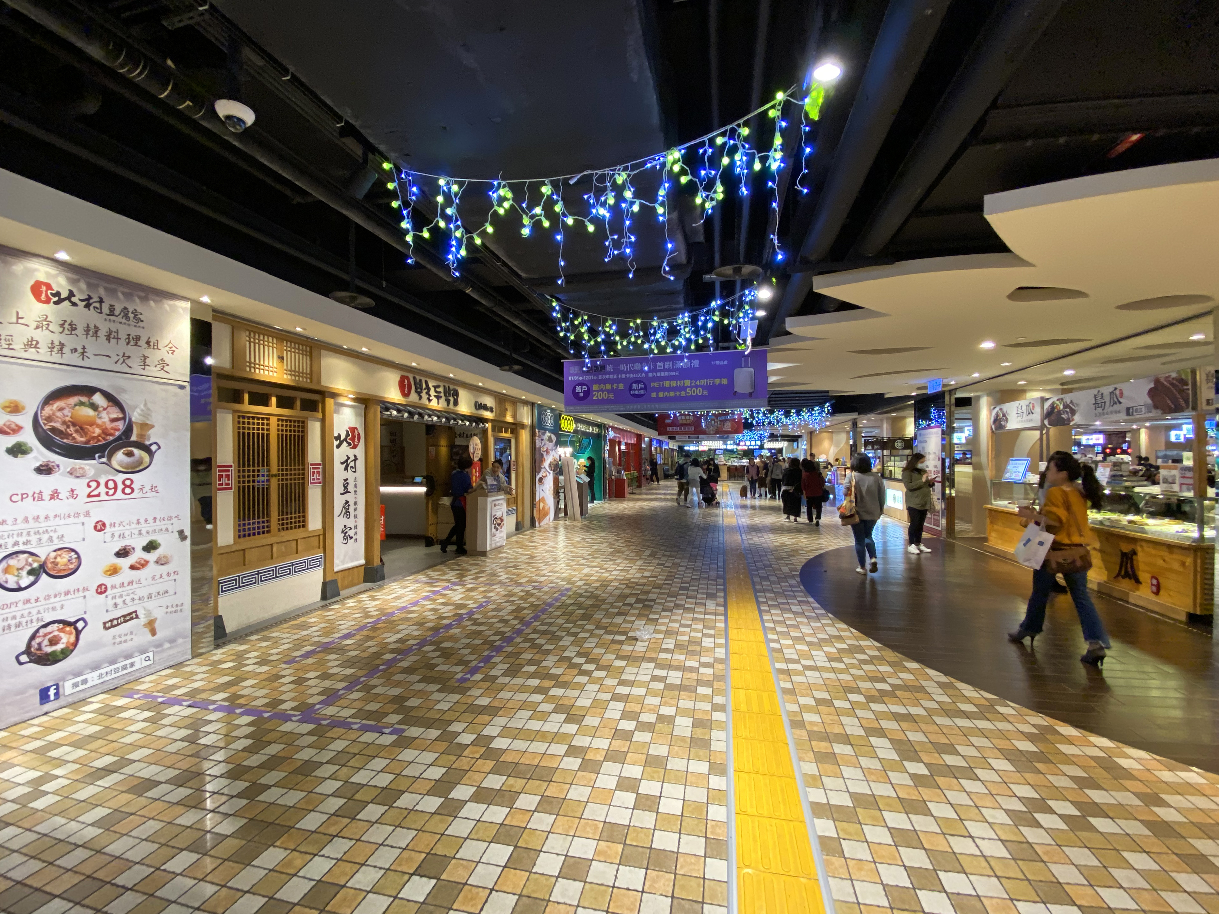 Uni-President Department Store Taipei B2